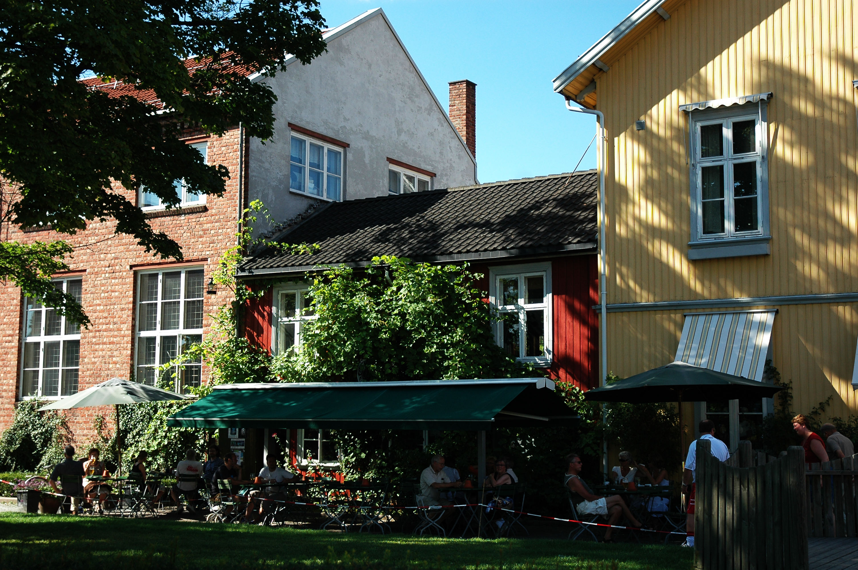 Drøbak, Norwegen; (en) Drøbak, Norway